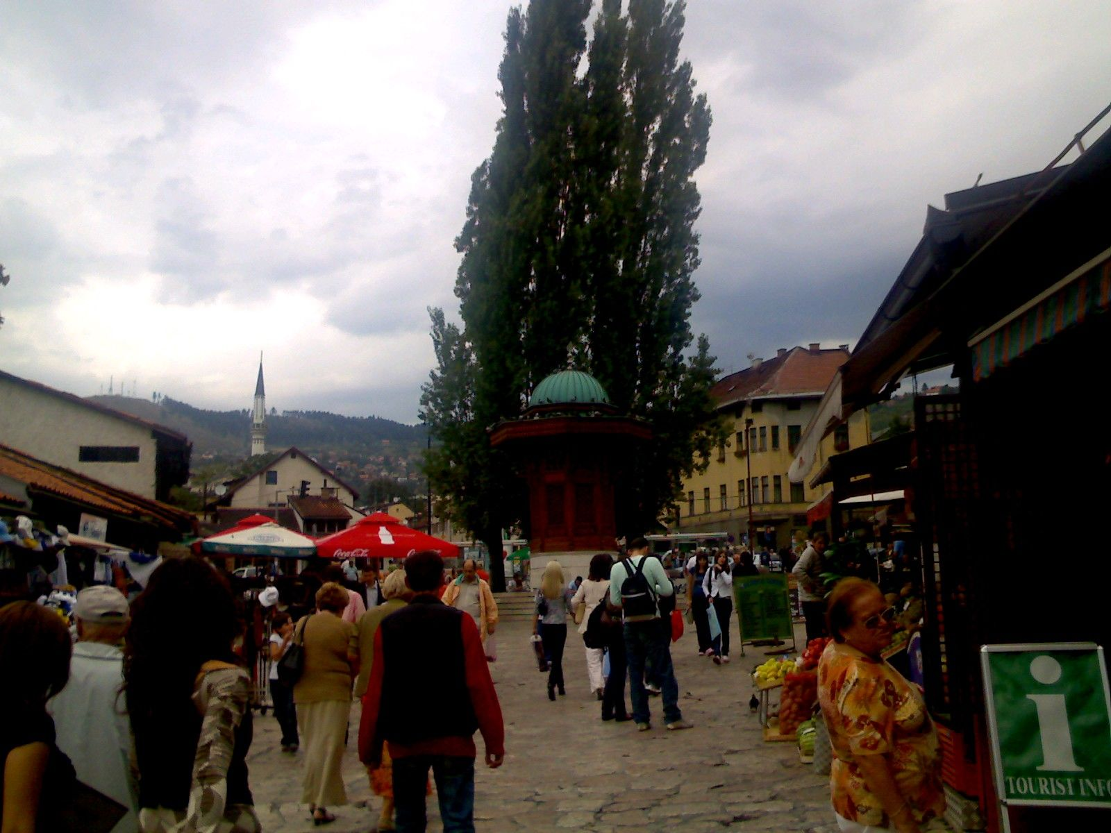 Sarajevo historical centre square